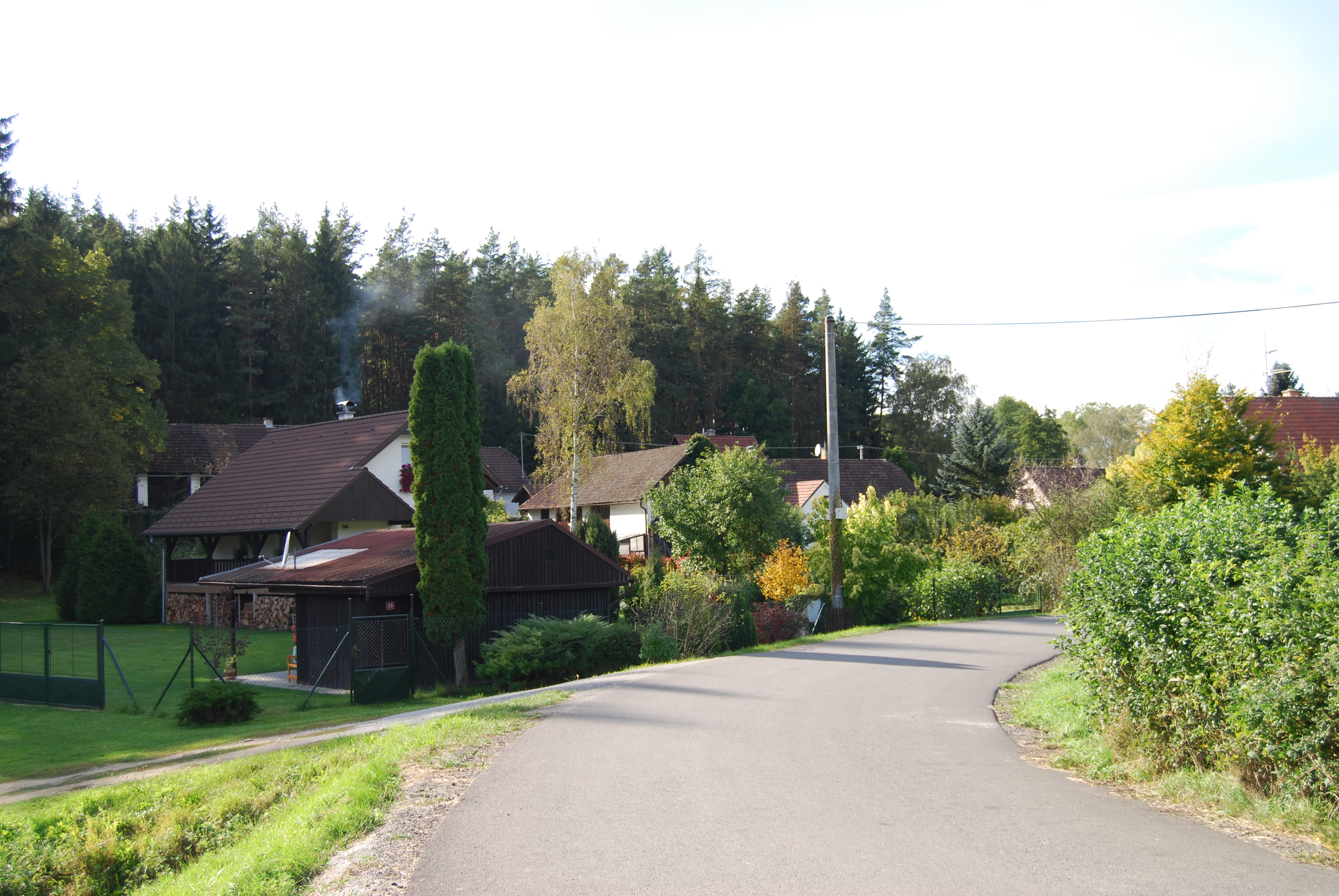 Pohled na začátek obce. Srlín je část obce Bernartice v okrese Písek. Česká republika.